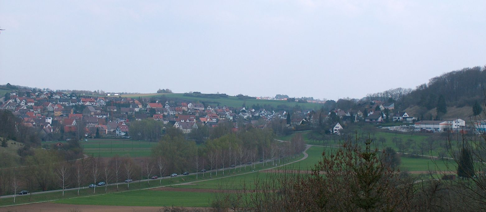 Weil der Stadt, Ortsteil Schafhausen (linke Seite alter Ortskern mit Kirche, dahinter am Hang das Wohngebiet Weiler und rechts am Hang der Hacksberg)